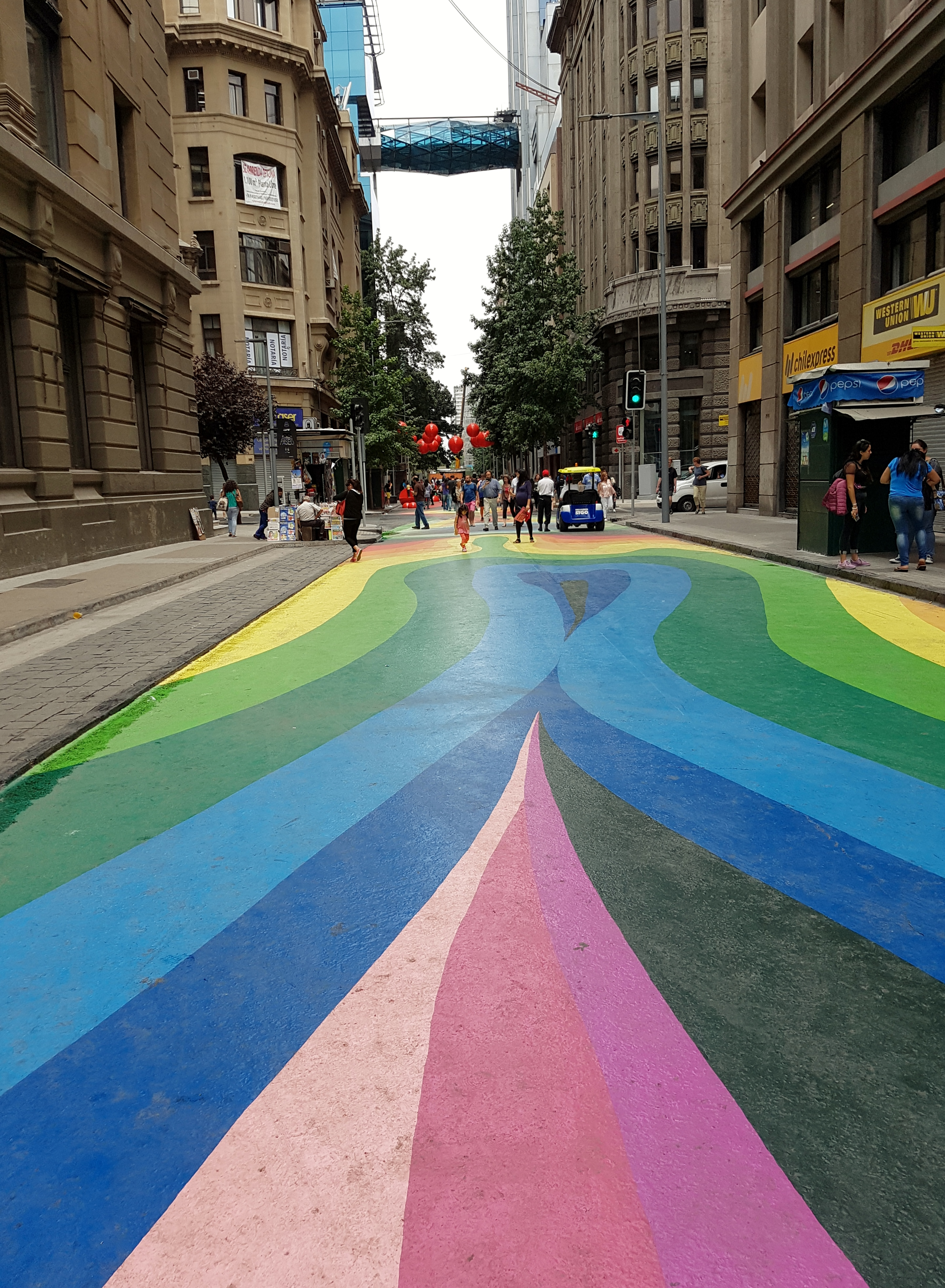 El paseo Bandera es una parte de la calle del mismo nombre (en Santiago Centro, Chile), que fue intervenida con un gran mural de piso diseñado por el grafitero Dasic (Francisco Fernández) y otros elementos; el proyecto estuvo a cargo del Estudio Victoria en el que, además de Dasic, participan el arquitecto Juan Carlos López y el gestor cultural Esteban Barrera. El paseo se extiende desde Moneda hasta Compañía y cubre una superficie de 3.300 metros cuadrados, unificando, con la pintura, un tramo de calzada de 400 metros lineales.